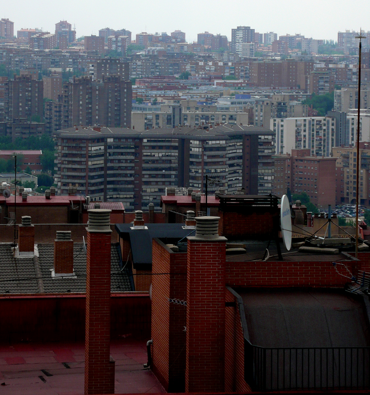 Moratalaz